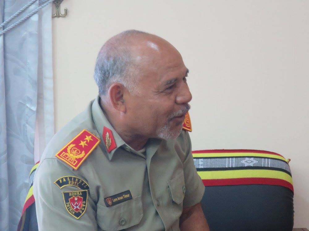 Lere Anan Timor